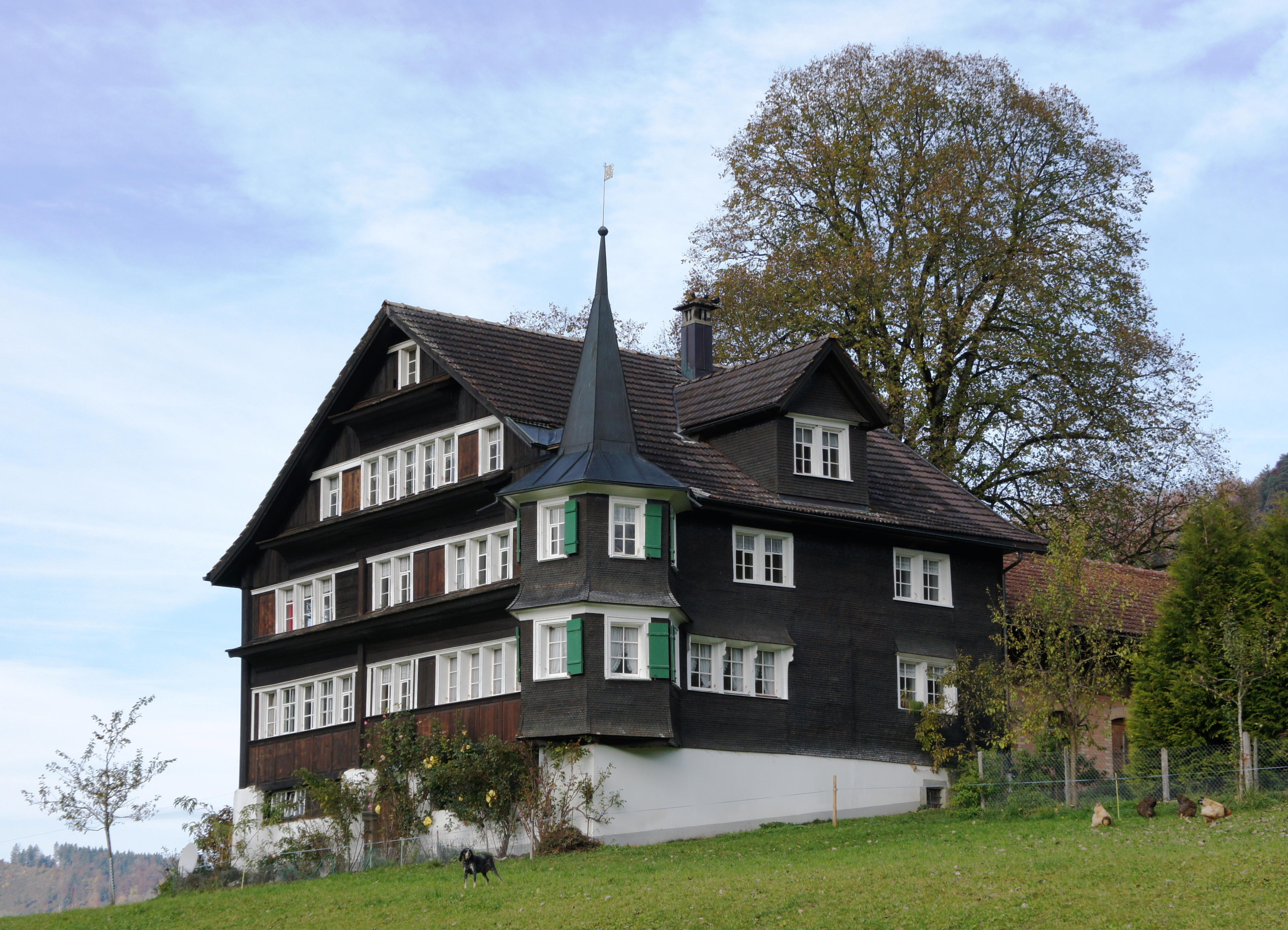 Blick von Südosten auf das obere Türmlihaus im Weiler Furt, Gemeinde Neckertal. Das Erdgeschoss ist gemauert, der obere Teil ein Holzbau. Das Haus hat vier Stockwerke, davon zwei unter dem Dachstock. Die ersten drei Fensterreihen sind mit einer Schindel-Simse überdacht. Die beiden Seitenfassaden, sowie der kleine Erker-Turm an der Südostecke, sind mit einem Holzschindelschirm versehen. Das Türmchen hat nach aussen vier Seiten, jede davon hat ein Fenster mit grünen Holzläden. Es ist zweistöckig und hat eine spitzen Dachhut. Auf dem Dach über der Ostfassade ist eine Giebelgaube mit zweiteiligem Fenster. Der Eingang im Erdgeschoss hat einen Bogensturz. Das Kellergeschoss ist weiss verputzt, das Holz im oberen Teil ist naturbelassen dunkelbraun. Hinter dem Haus ist eine etwas niederere Scheune angebaut.